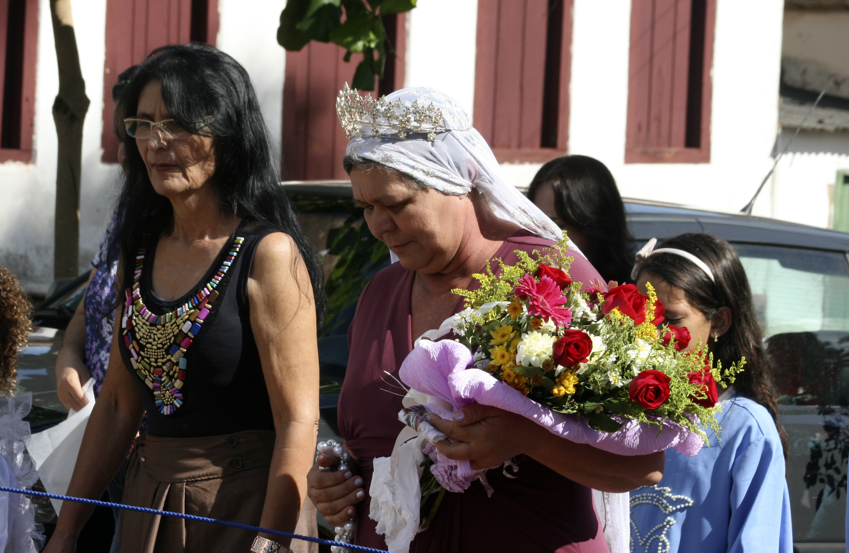 Festa de Santa Dica - Benedicta Cypriano Gomes